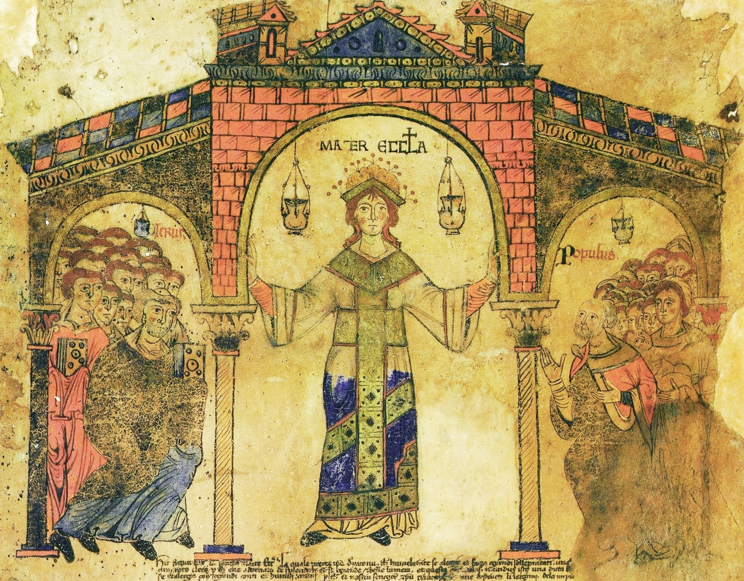 Die Mutter Kirche; Psalter aus Monte Cassino (heute in der Vatikanischen Bibliothek), ca. 1087 [1]